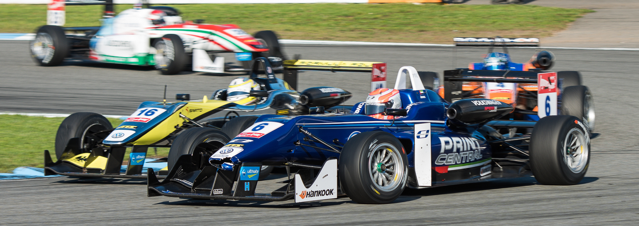 Carlin,DTM,Dallara F312,Deutsche Tourenwagen Masters,Edward Jones,F3 FIA European Championship,FIA Formel 3 Europameisterschaft,Hockenheimring,Motorsport,Volkswagen